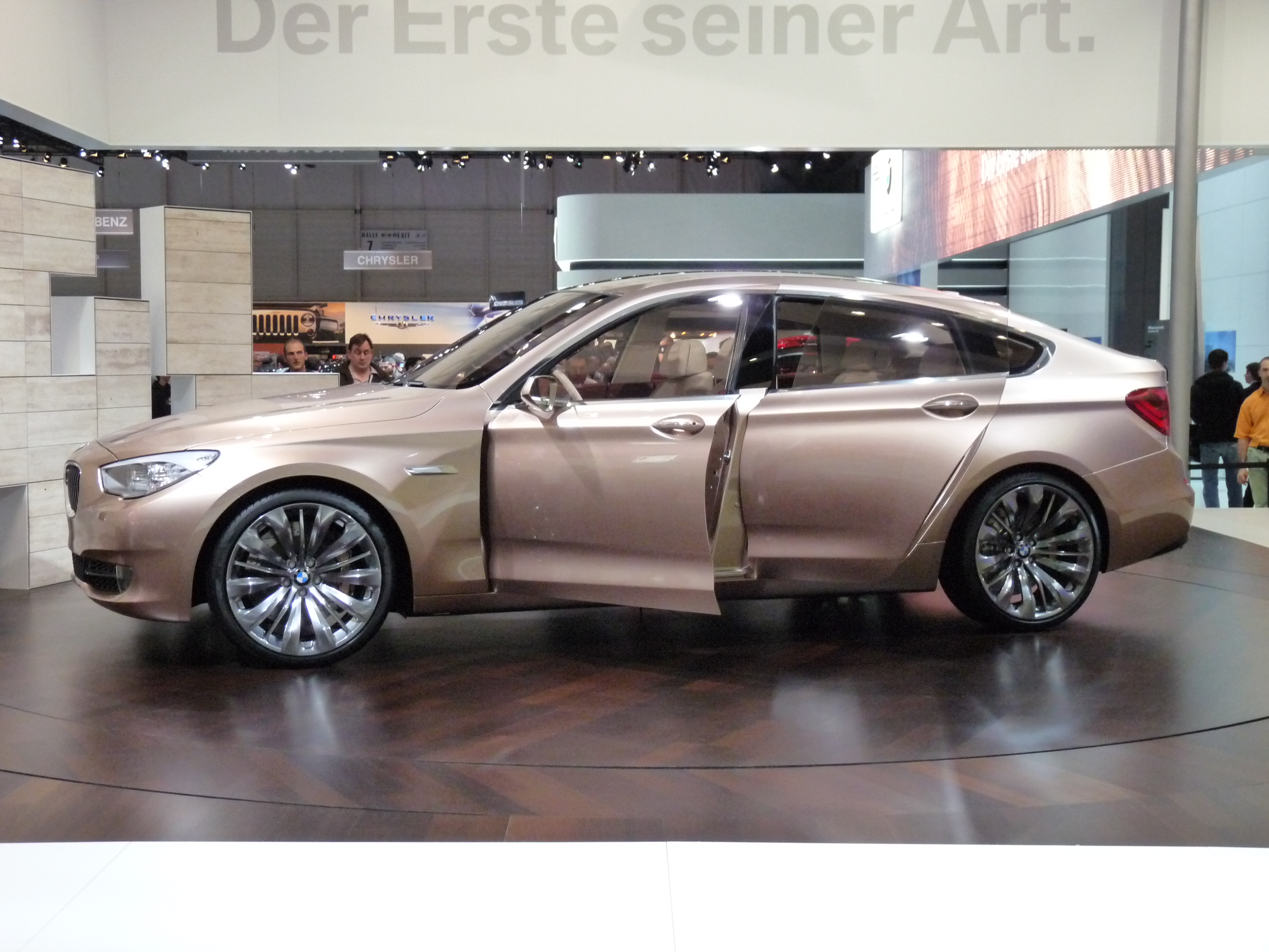 BMW Série 5 GT au Salon de Genève 2009